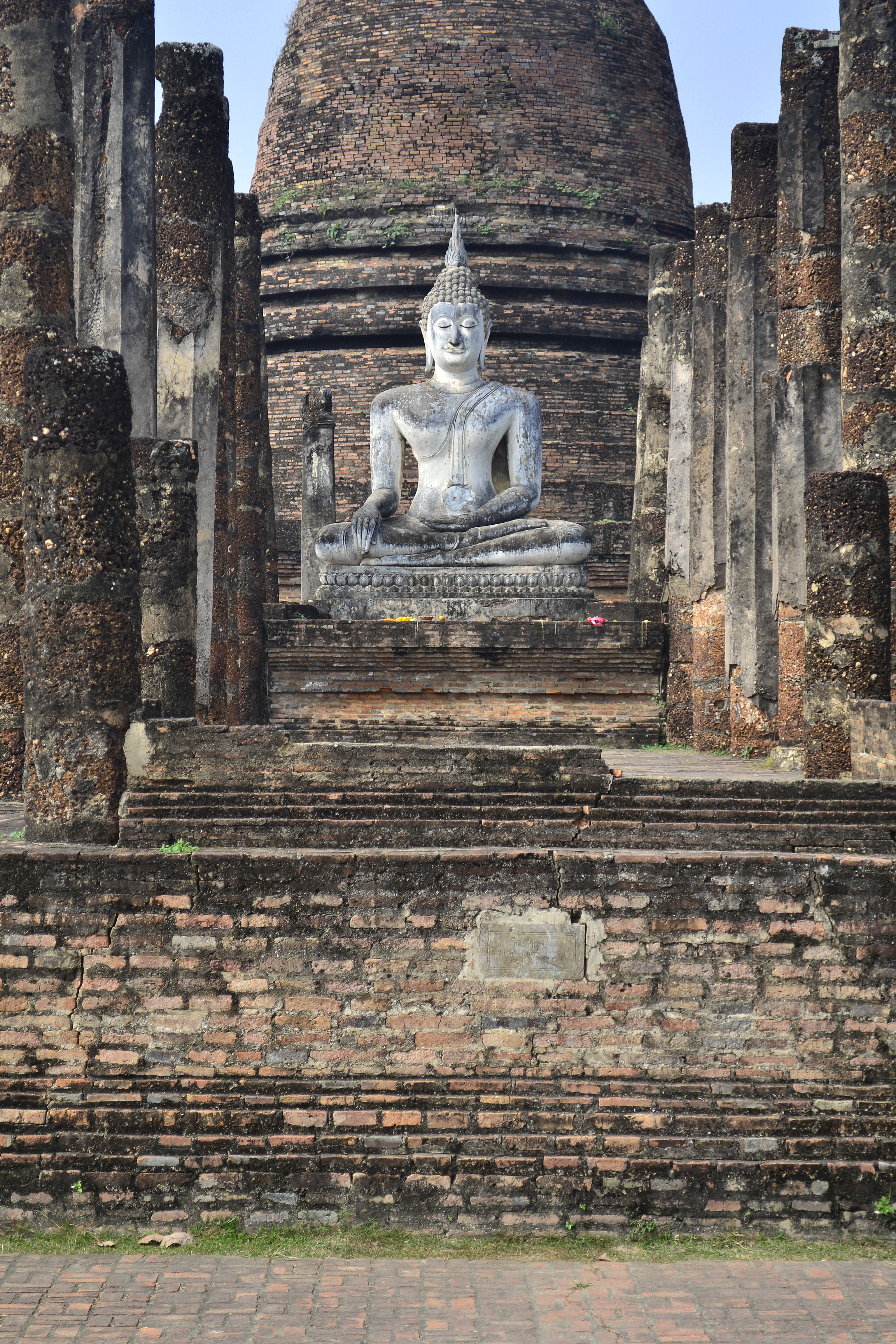 Viharn mit Buddhaskulptur vor dem Hauptchedi des Wat Sa Si im Geschichtspark Sukhothai